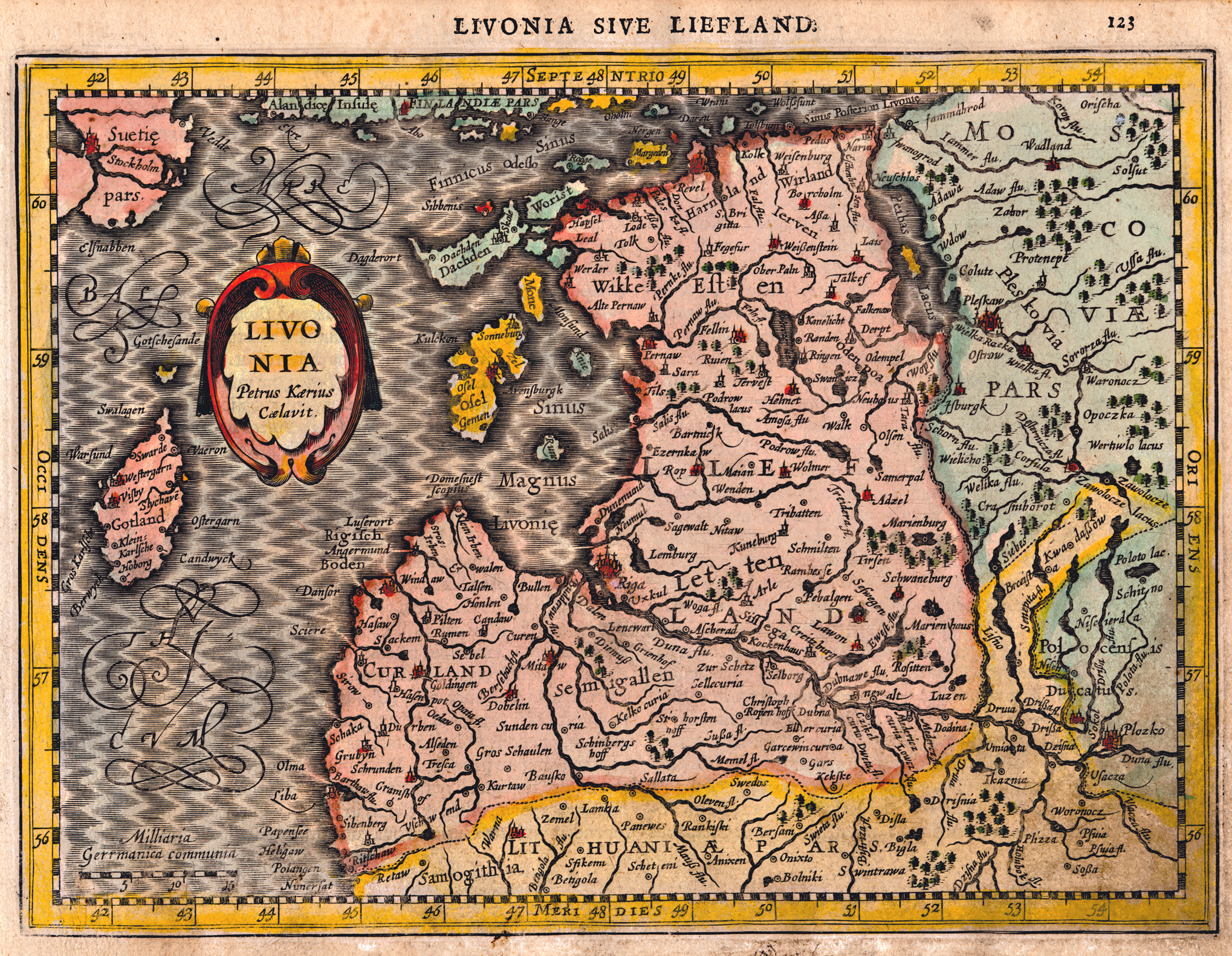 Livonia: Livonia sive Liefland Published in: Gerardi Mercatoris atlas sive cosmographicæ meditationes de fabrica mundi et figura in Amsterdam. Copper engraving, ca 1:3 400 000, 24 x 17 cm.